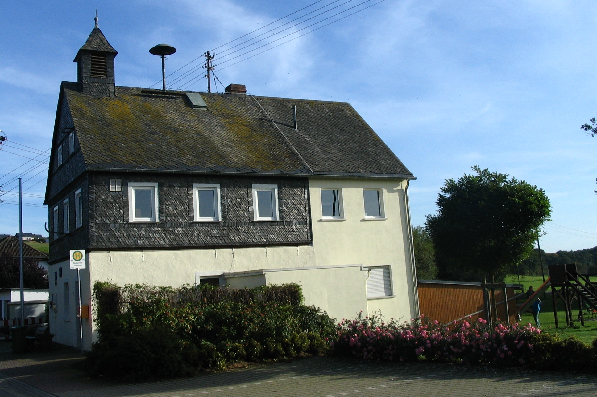 Todenroth, Gemeindehaus in der Dorfmitte